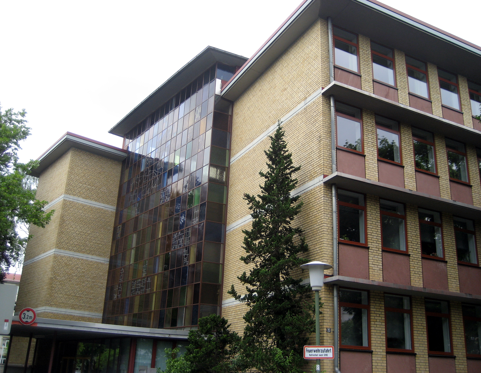 Hauptstelle der Bundesmonopolverwaltung für Brandwein, Friedrichsring 35 in 63069 Offenbach am Main. Architekt: Adolf Bayer, 1953